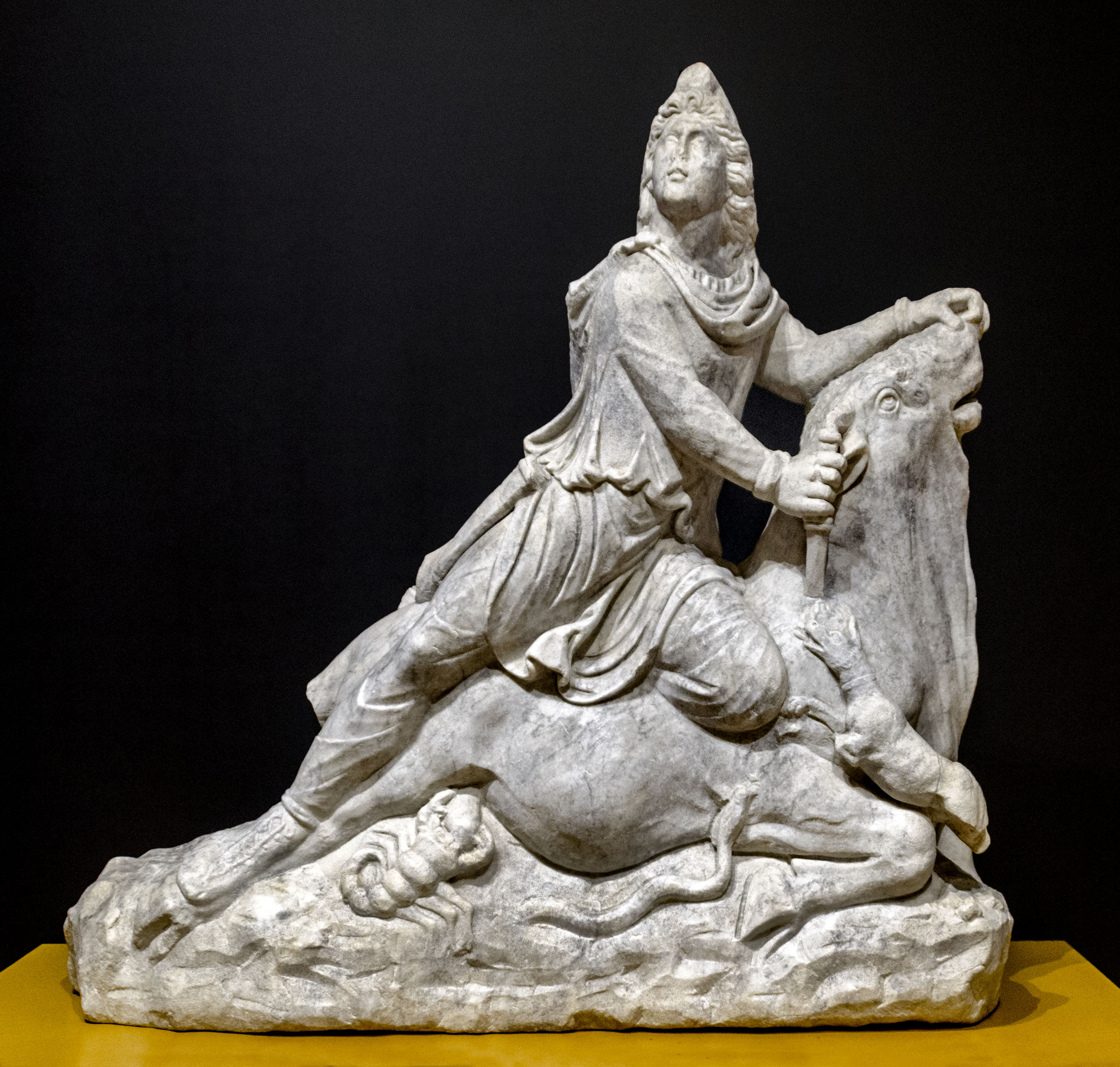 Museo Arqueológico y Etnológico de Córdoba (España).